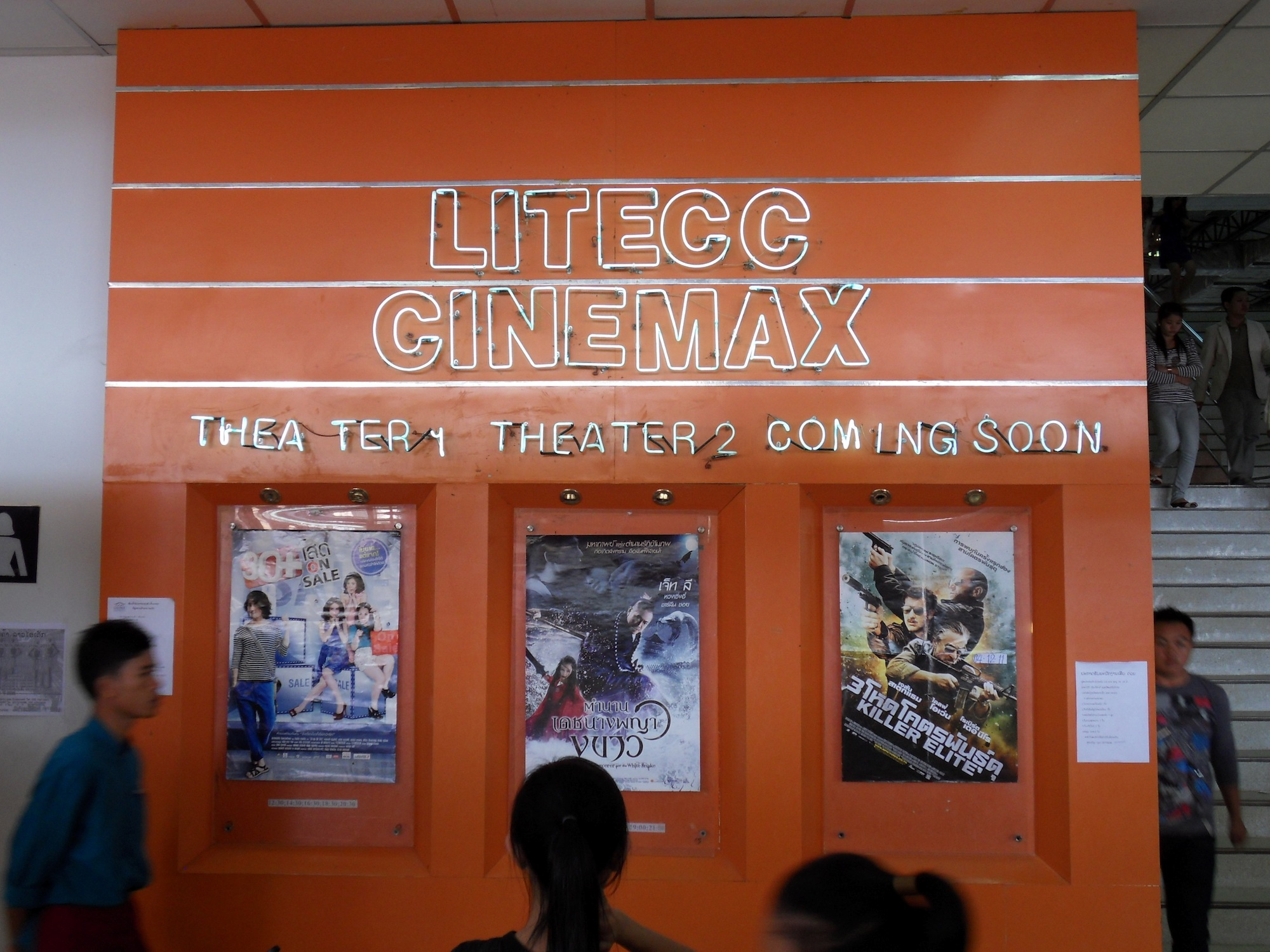 Programme du multiplexe Litecc dans le centre commercial Lao Itecc de Vientiane, 3 décembre 2011.